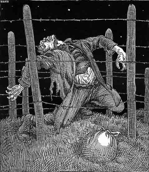 Cartoon van Albert Hahn over de Dodendraad op de Belgisch-Nederlandse grens. Onderschrift: AAN DE BELGISCHE GRENS - "Weer is een Belg, die over de grens naar Nederland wilde vluchten, in het electrische prikkeldraad blijven hangen en door den stroom gedood. (Krantenbericht van iederen dag).